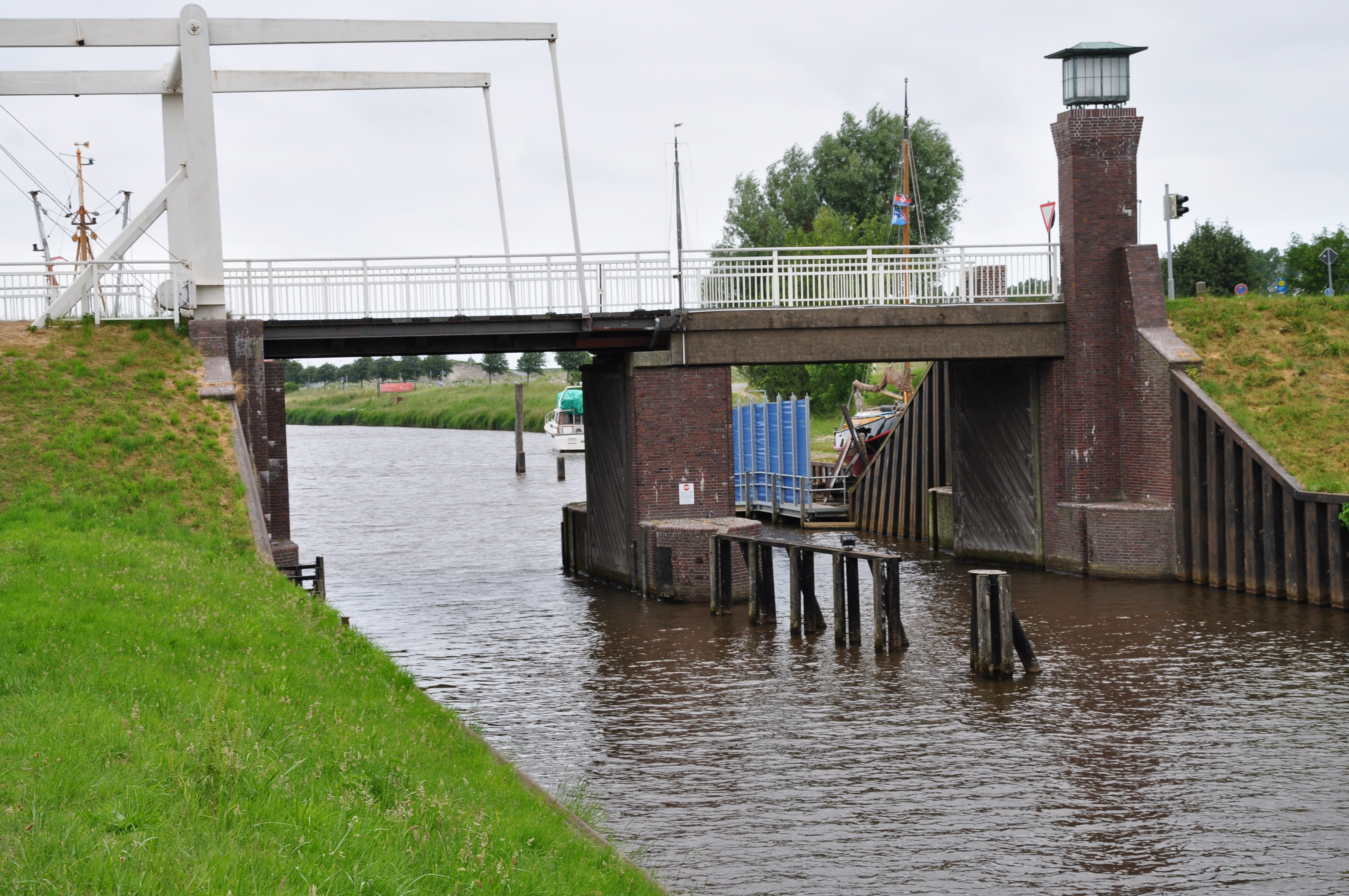 Die Friedrichsschleuse in Harlesiel, Wittmund, Niedersachsen